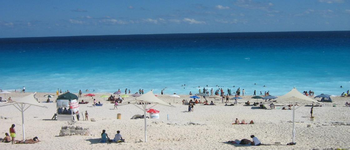 Vista de la Playa El Mirador en Cancun